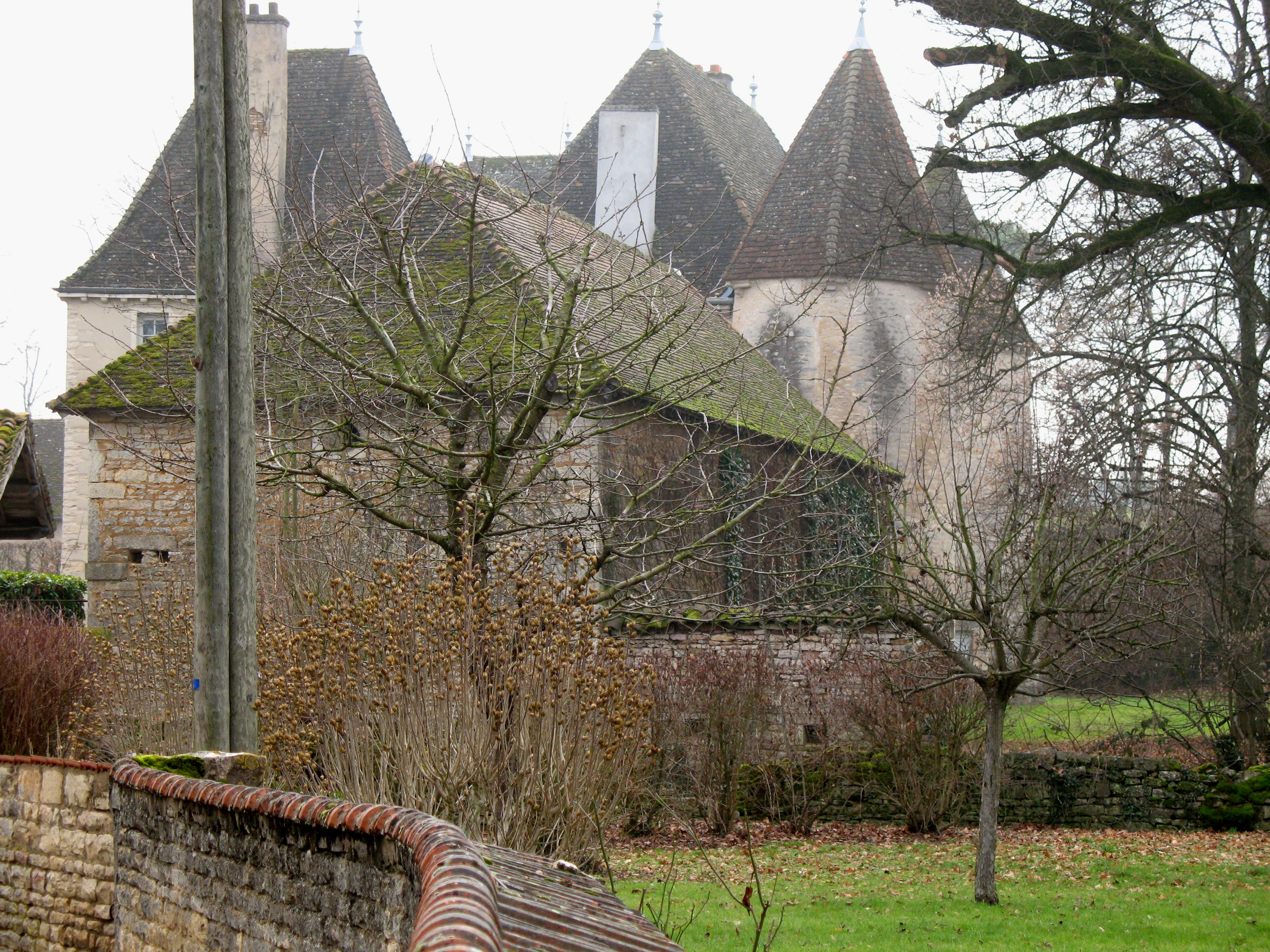 château de Mercey - Montbellet (Saône-et-Loire)